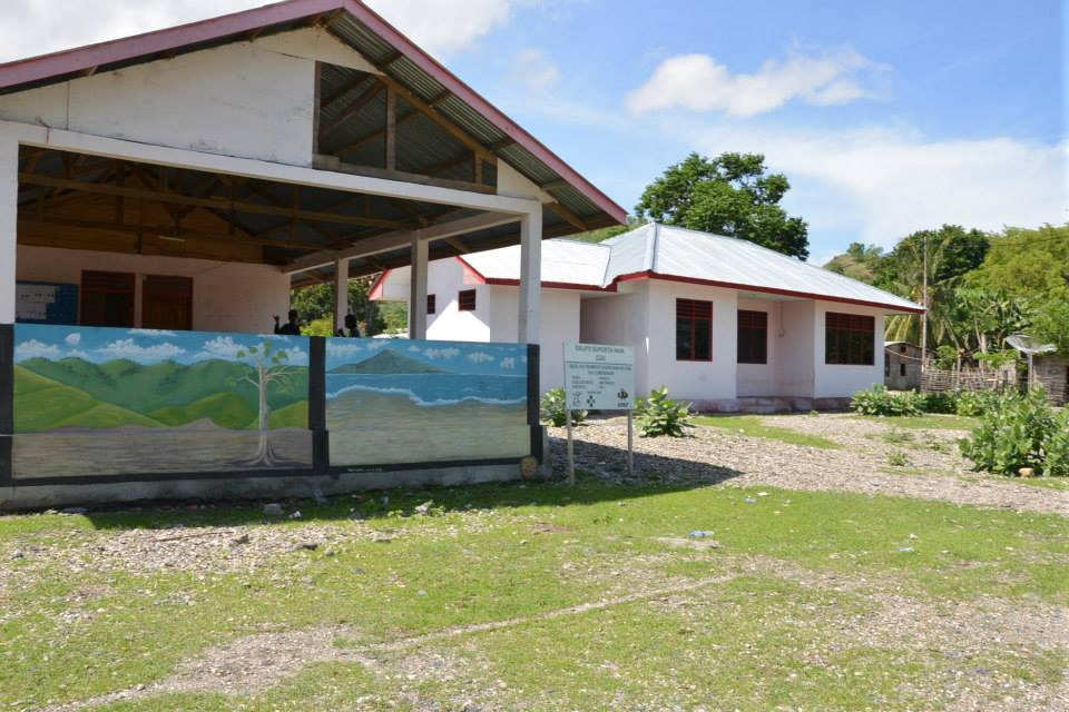 Sitz des Sucos Sabuli